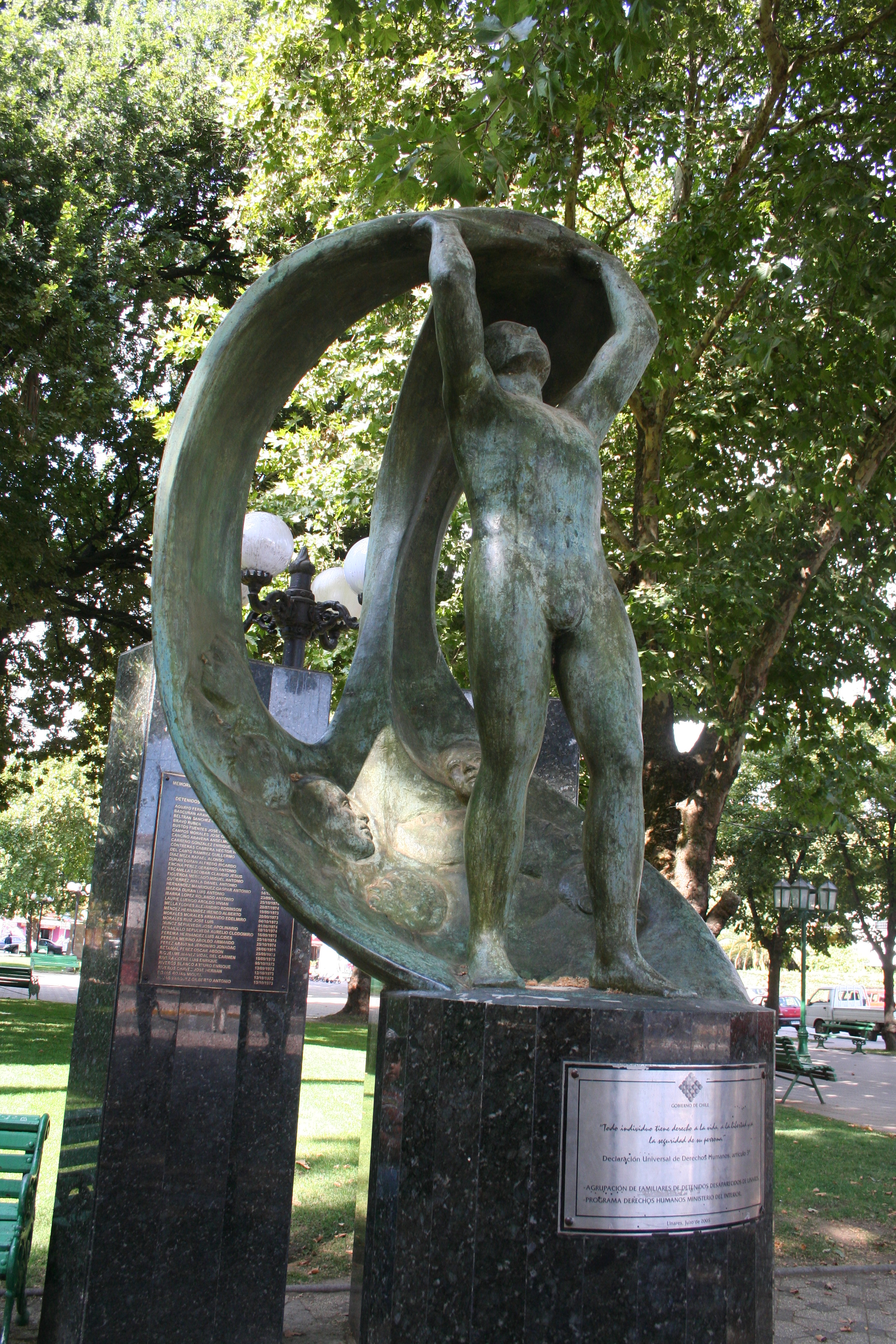 Memorial conmemorativo de la violación de los DDHH en Chile durante el régimen de Pinochet